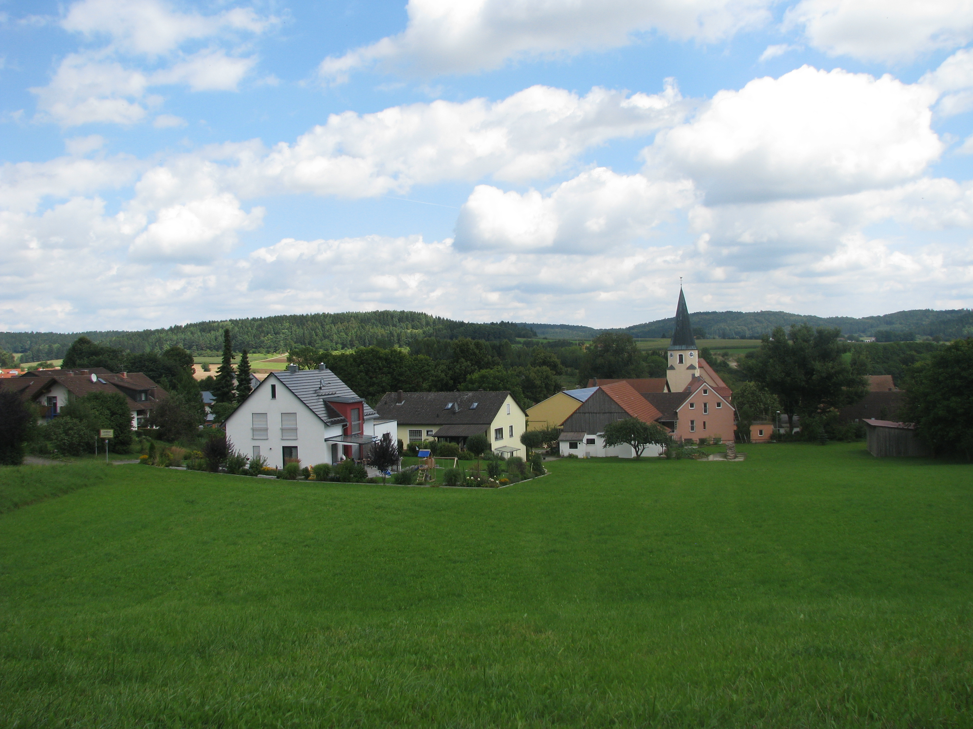 Laaber, Gemeindeteil von Pilsach im Landkreis Neumarkt in der Oberpfalz